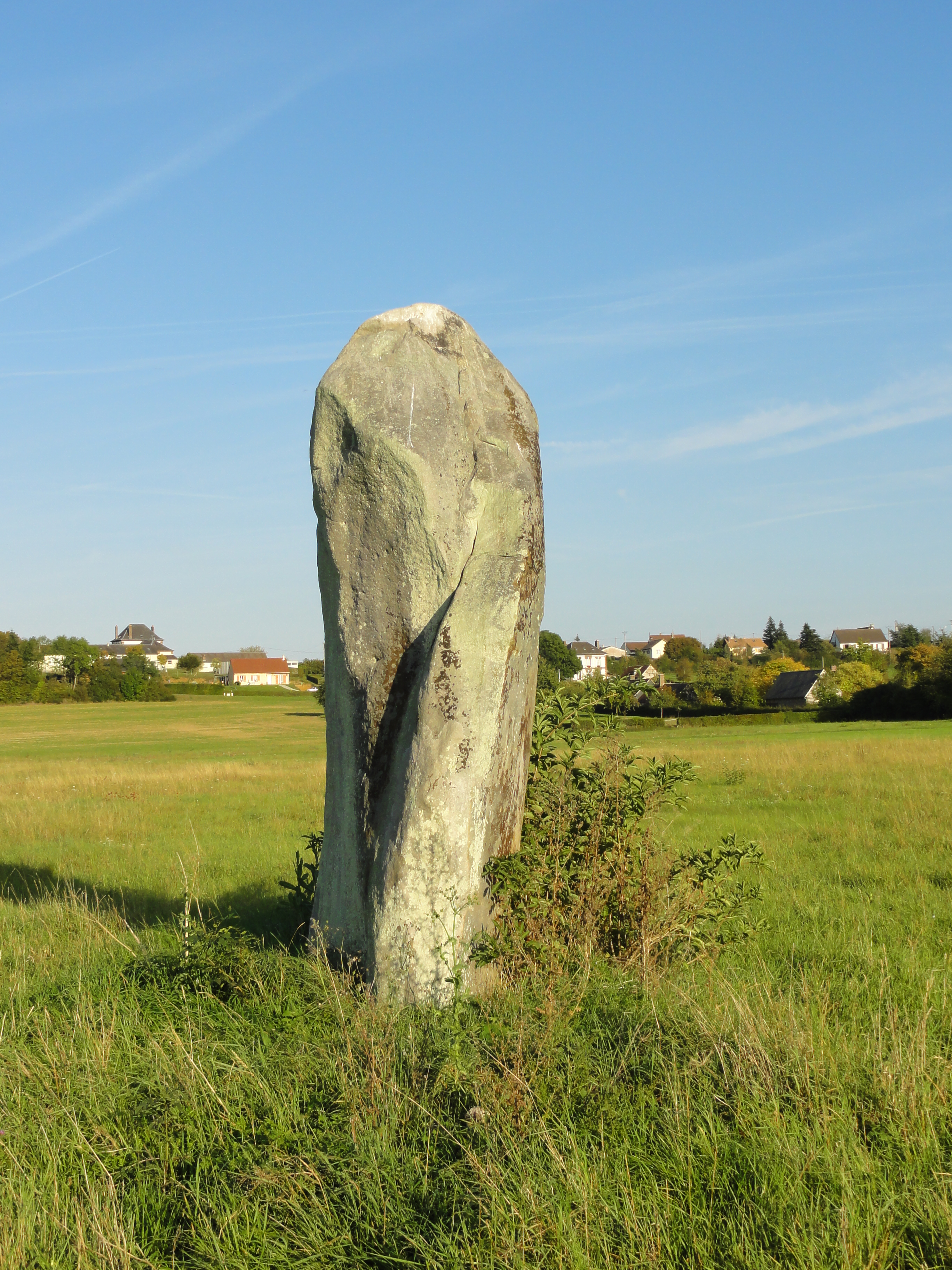 Menhir de Neaufles Auvergny, dit "la Pierre de Gargantua" .